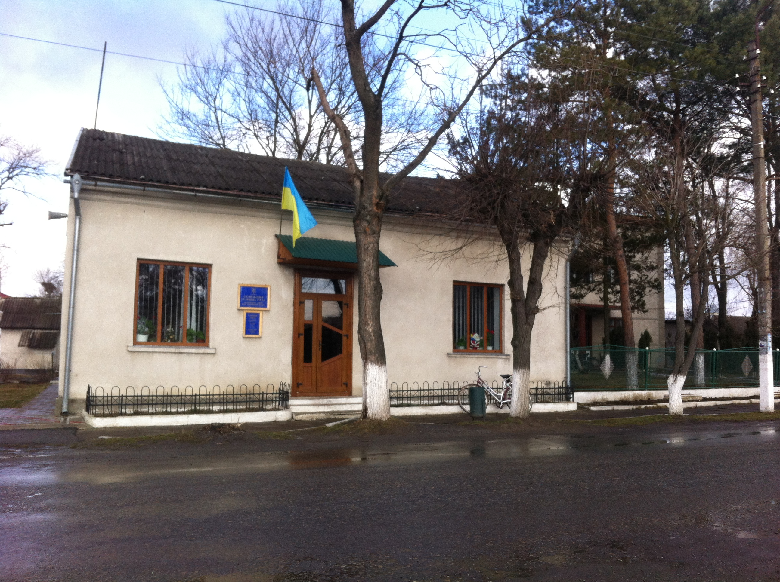 Селищна рада